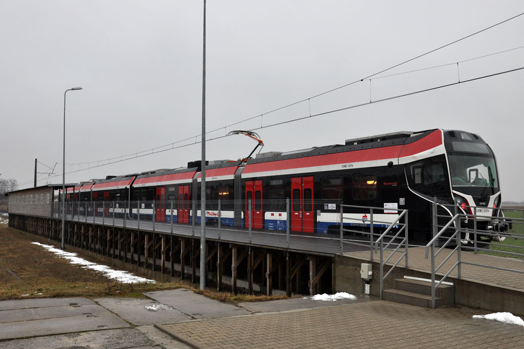 Elektryczny zespół trakcyjny 39WE-001 dla Warszawskiej Kolei Dojazdowej podczas testów homologacyjnych na torze doświadczalnym Instytutu Kolejnictwa w Węglewie koło Żmigrodu.